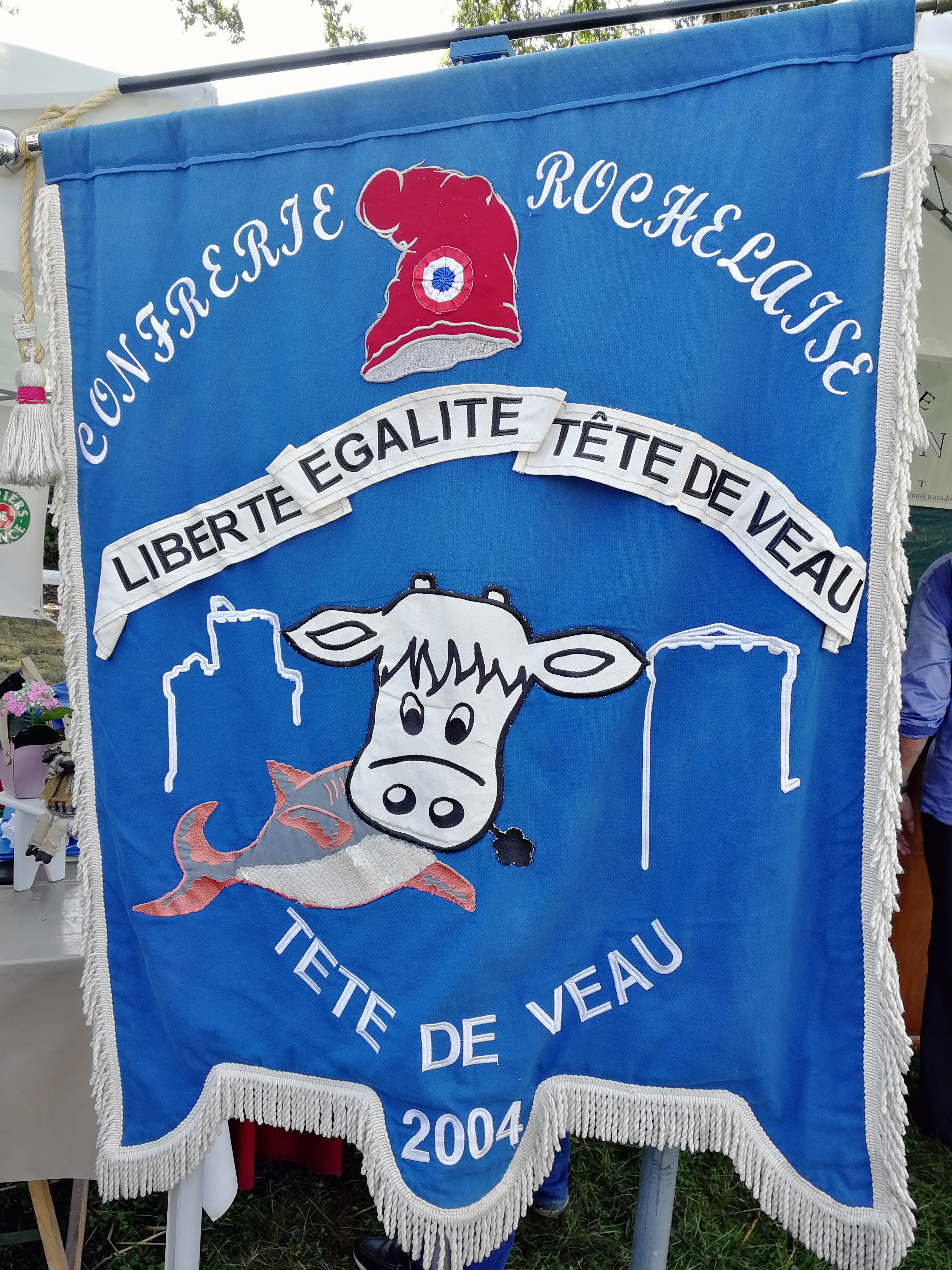 Bannière représentant une tête de veau mangeant un poisson. Elle est surmontée des inscriptions « Confrérie Rochelaise » autour d'une cocarde révolutionnaire et « Liberté, égalité, tête de veau ». En bas : « Tête de veau 2004 ».